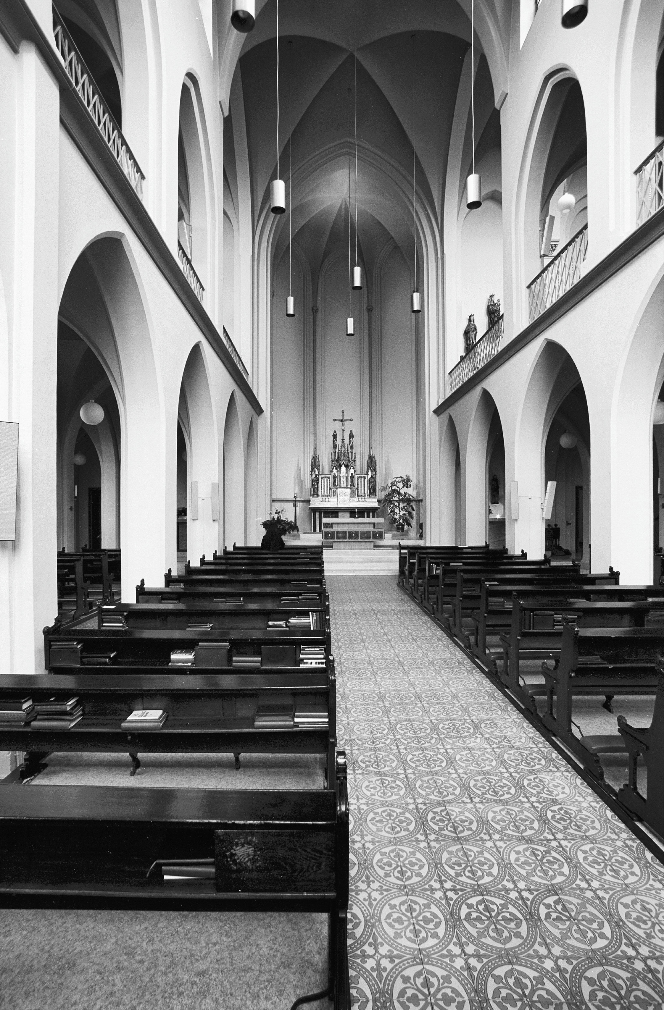 Huize Gabriel: kapel, interieur naar het oosten